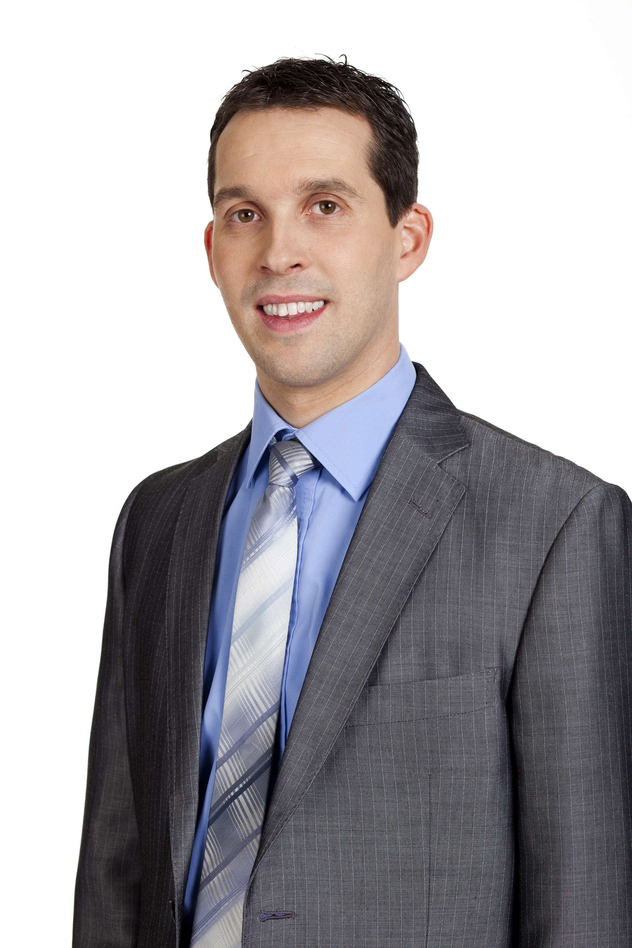 Michael Götte